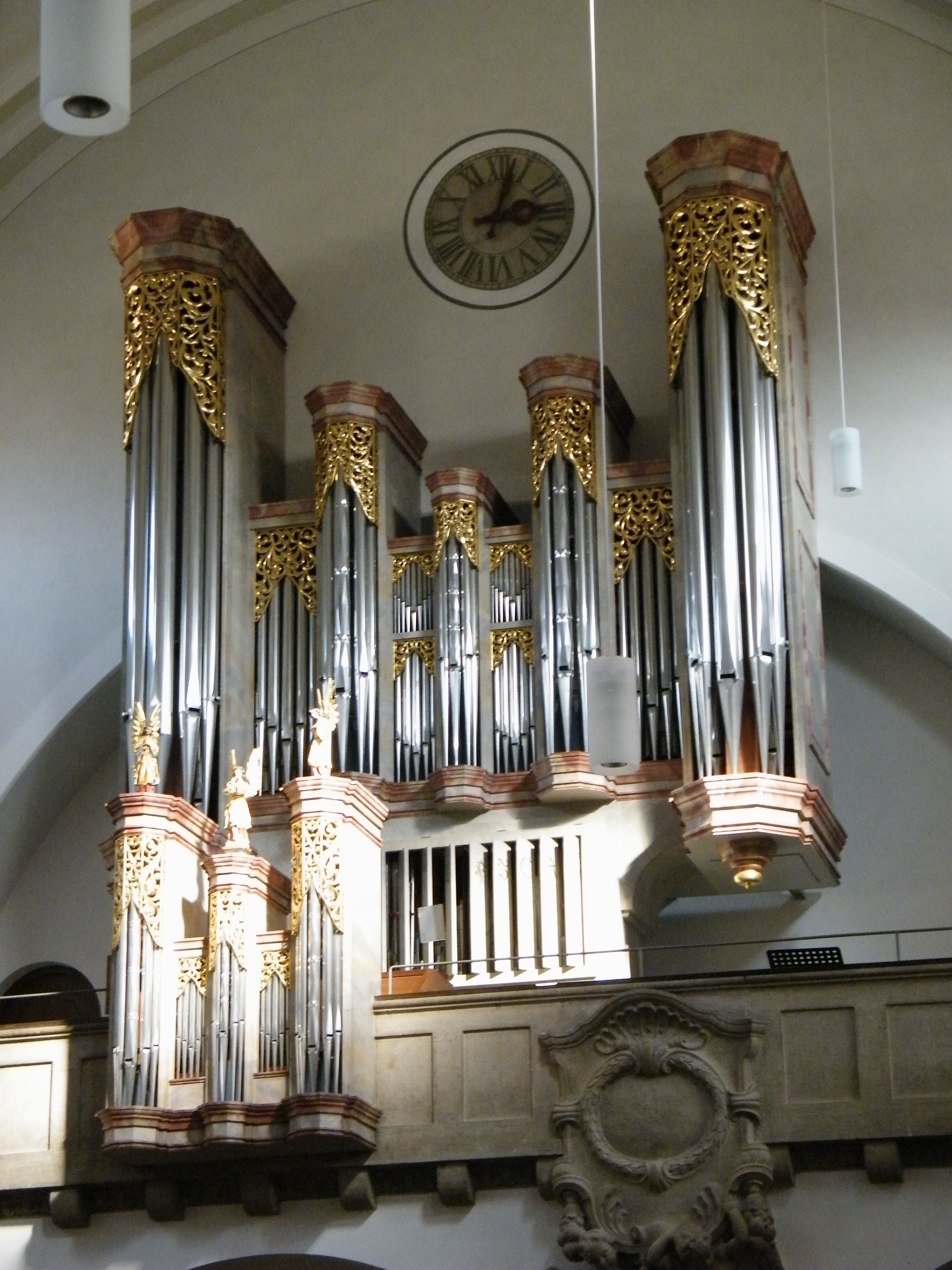 Kirche St. Anton in Kempten.